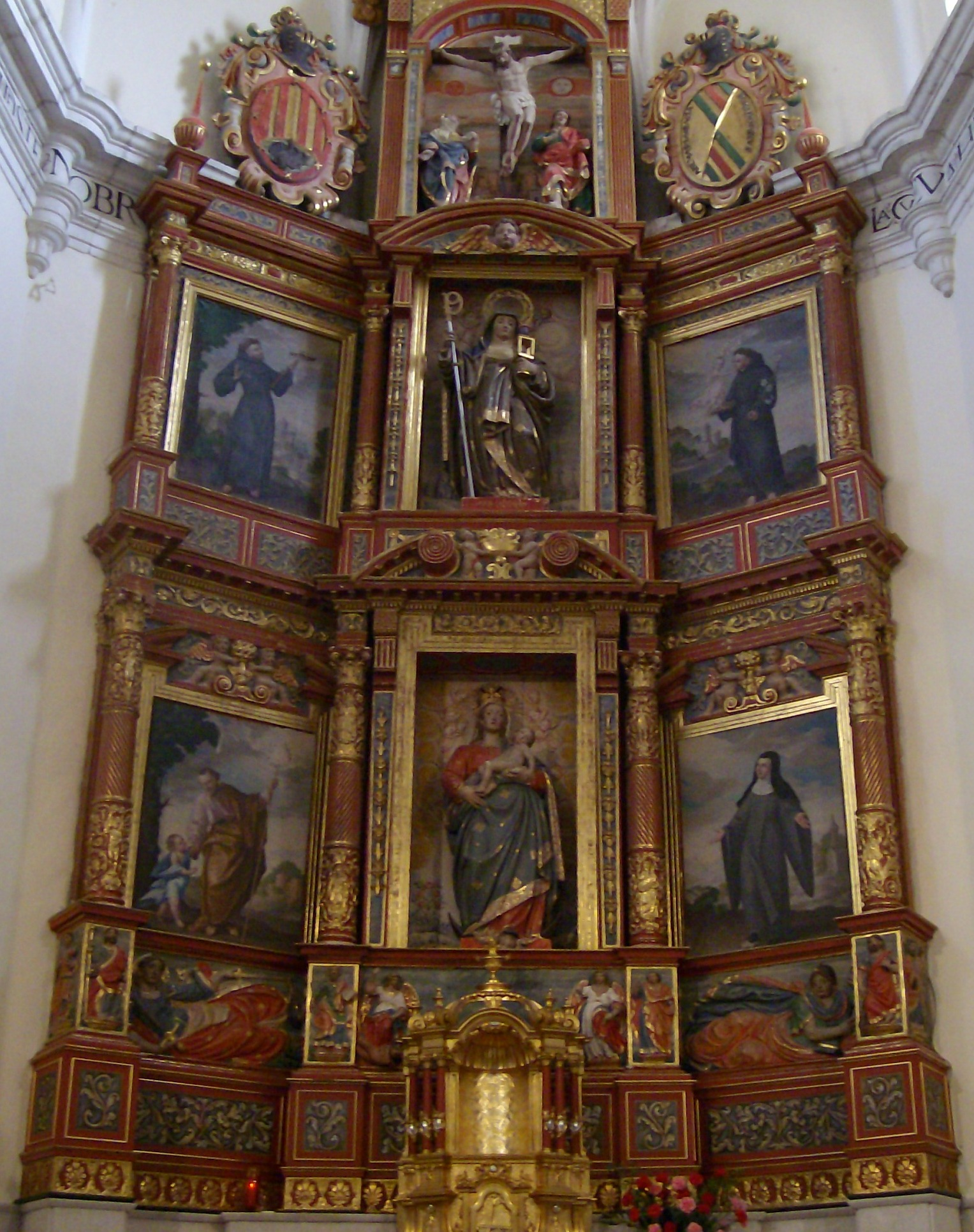 Retablo mayor de la iglesia conventual de Santa Clara (Cuéllar), obra de Isaac de Juni.